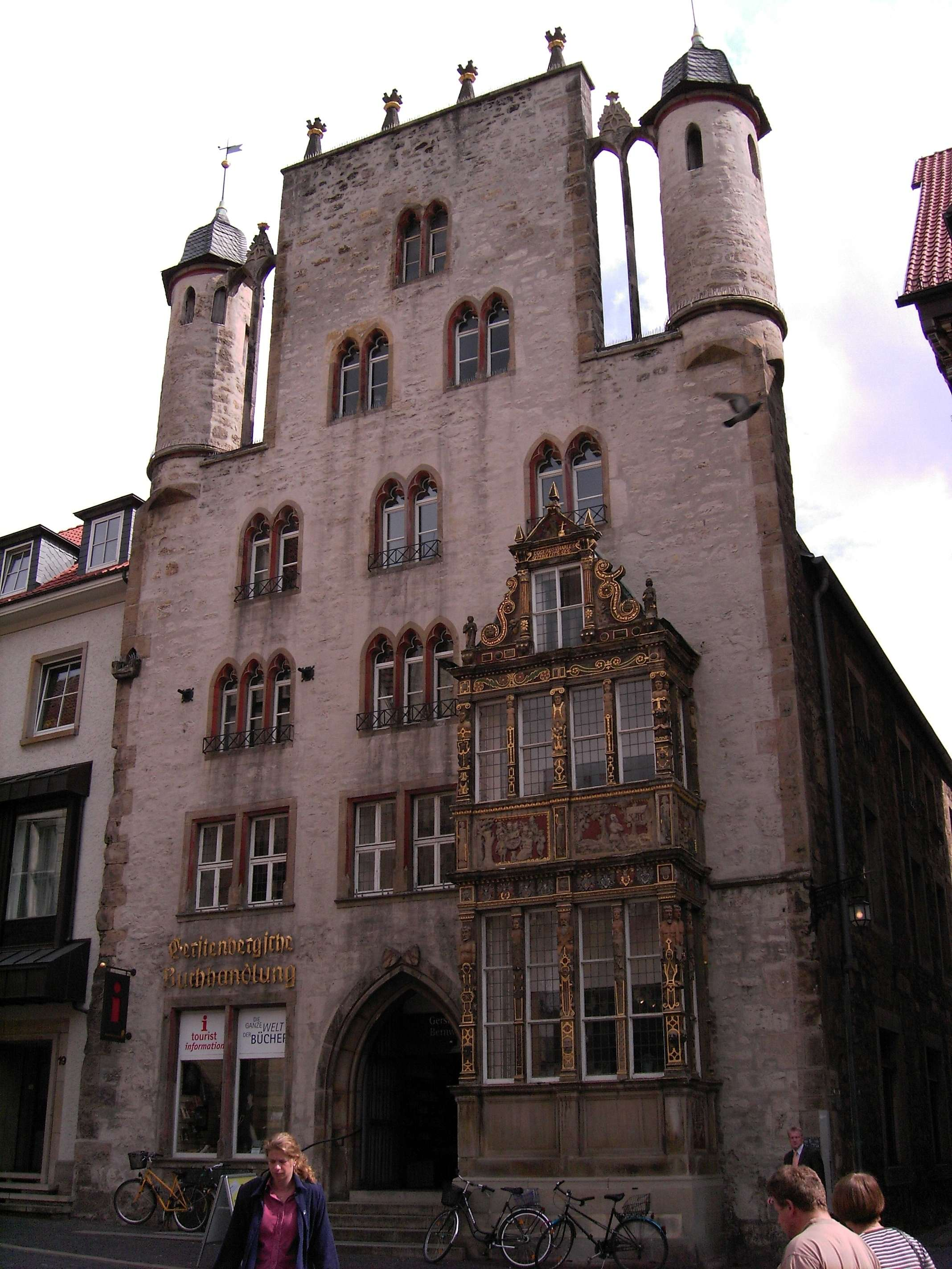 Hildesheim, Main market, Tempelhaus